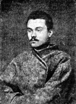 Sergej Nikolaevic Bobochov (1858-1889)